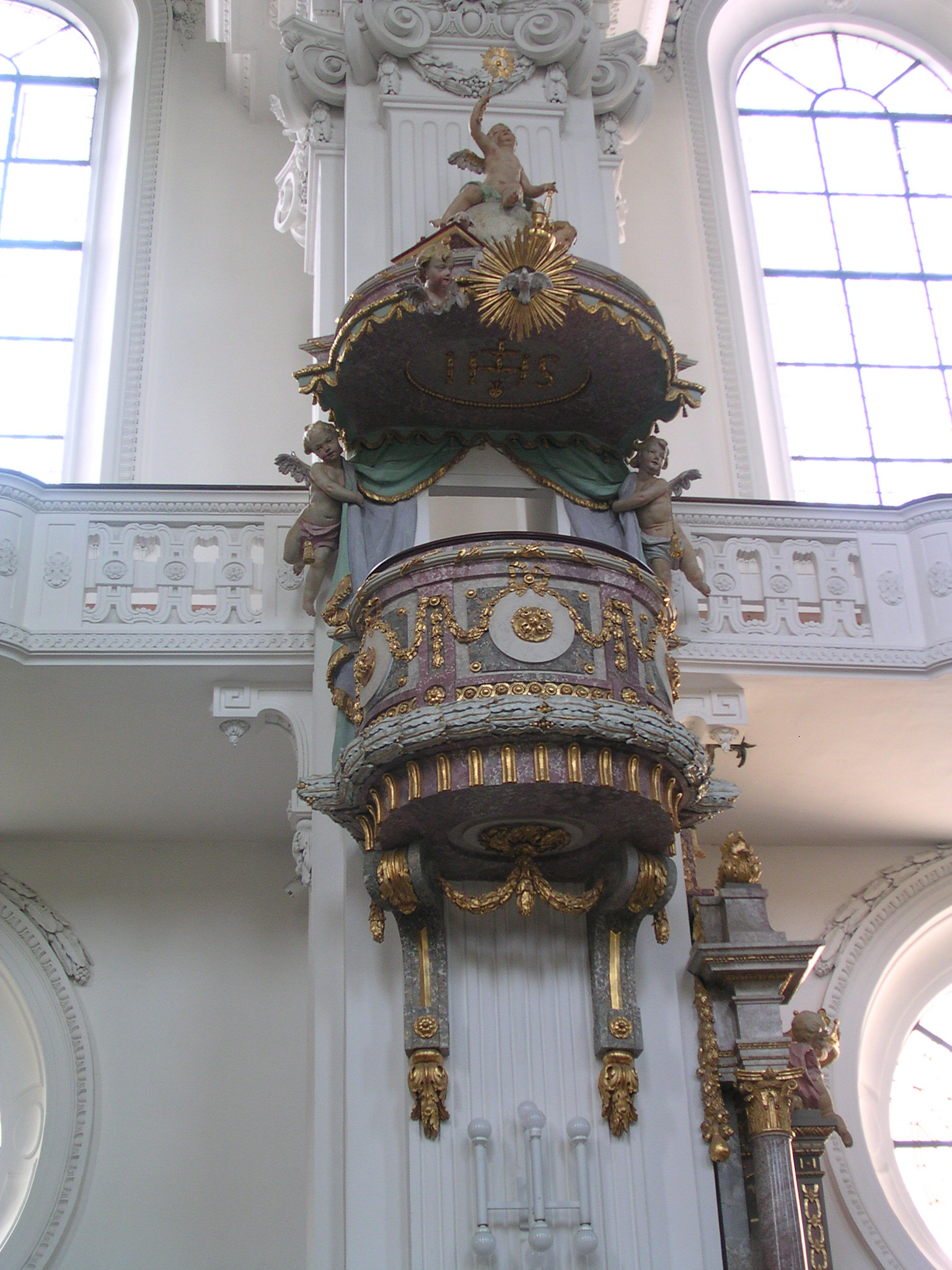 Kanzel in der Pfarrkirche St. Verena in Rot an der Rot - Auf dem Schalldeckel erkennbar, ein Buch mit sieben Siegeln, darauf ein Lamm liegend. An der Schalldeckelfront die Taube, den Heiligen Geist versinnbildlichend.